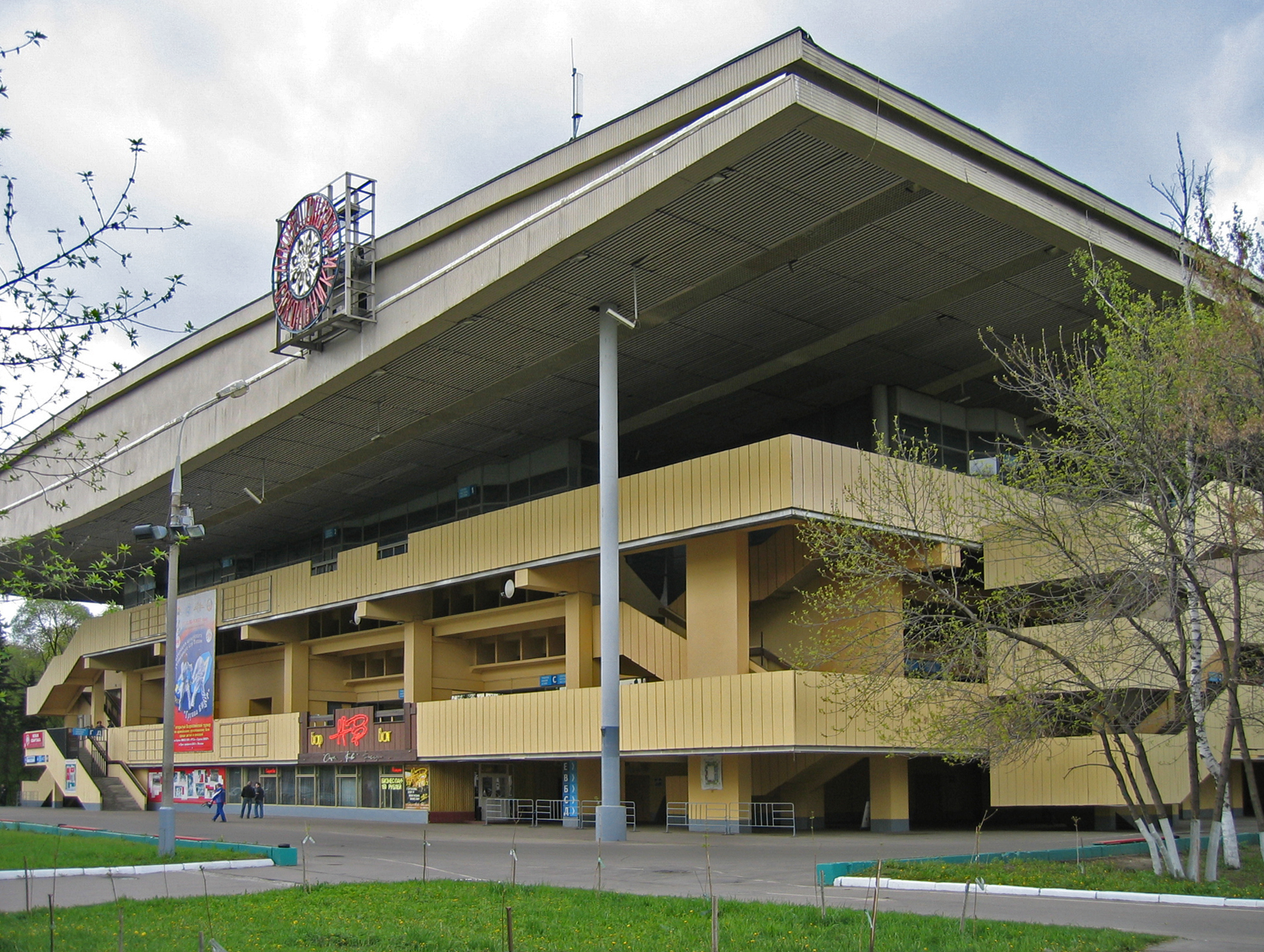 Sokolniki-Arena Moskau